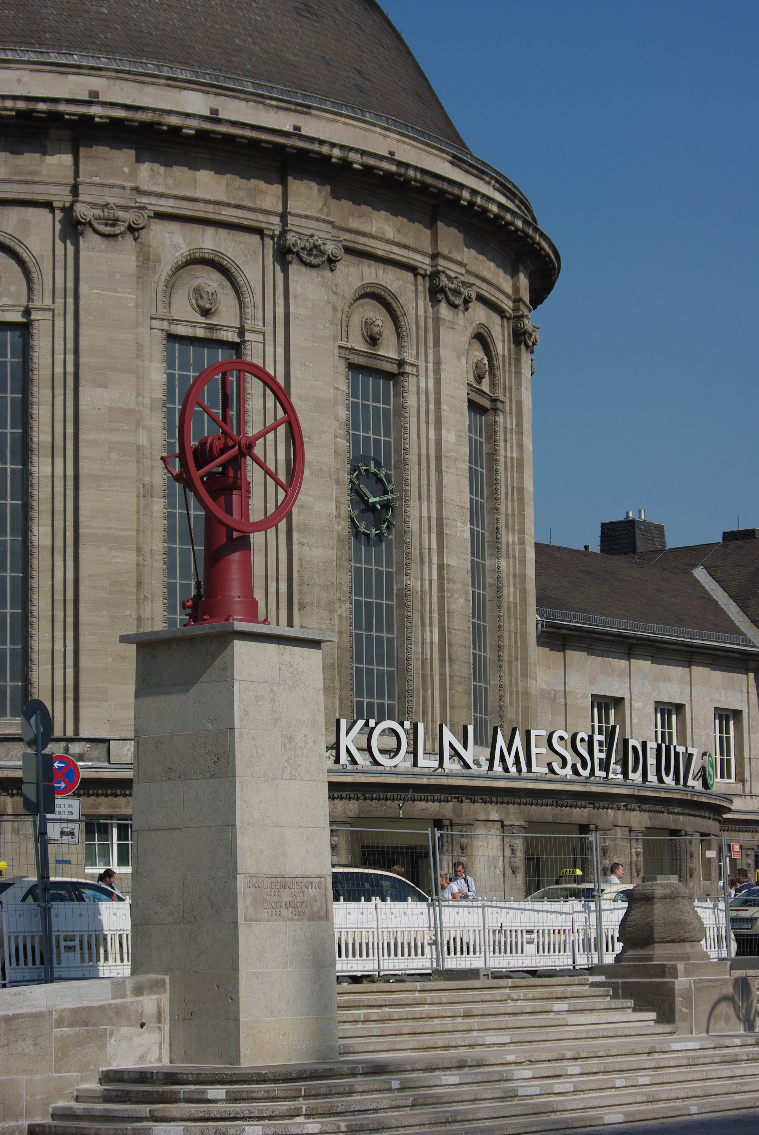 Ottomotor-Denkmal vor dem Bahnhofsgebäude Köln-Messe/Deutz, Ottoplatz, Köln This is a photograph of an architectural monument. Object location50° 56′ 24.63″ N, 6° 58′ 26.89″ E